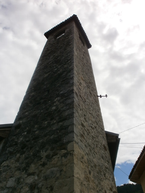 Сахат кула Мехмед-паше Кукавице Сликава е подигната во рамките на проектот „По трагата на душата 2015“.